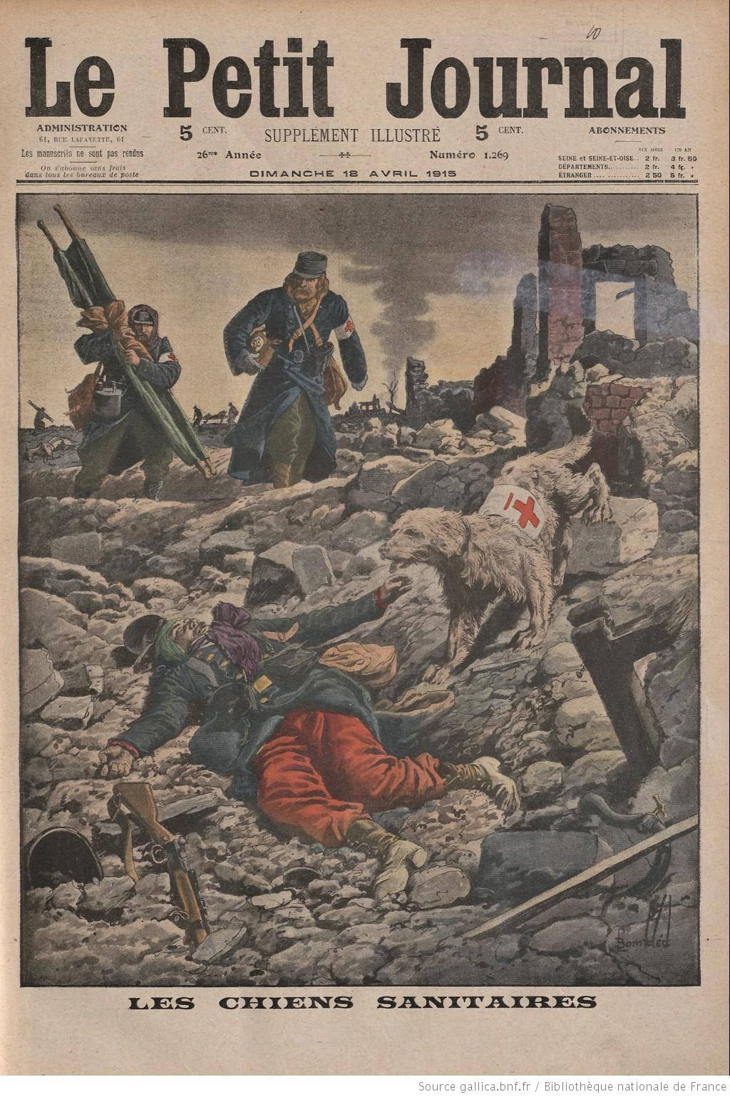 Le petit journal du 18 4 15 Les chiens sanitaires